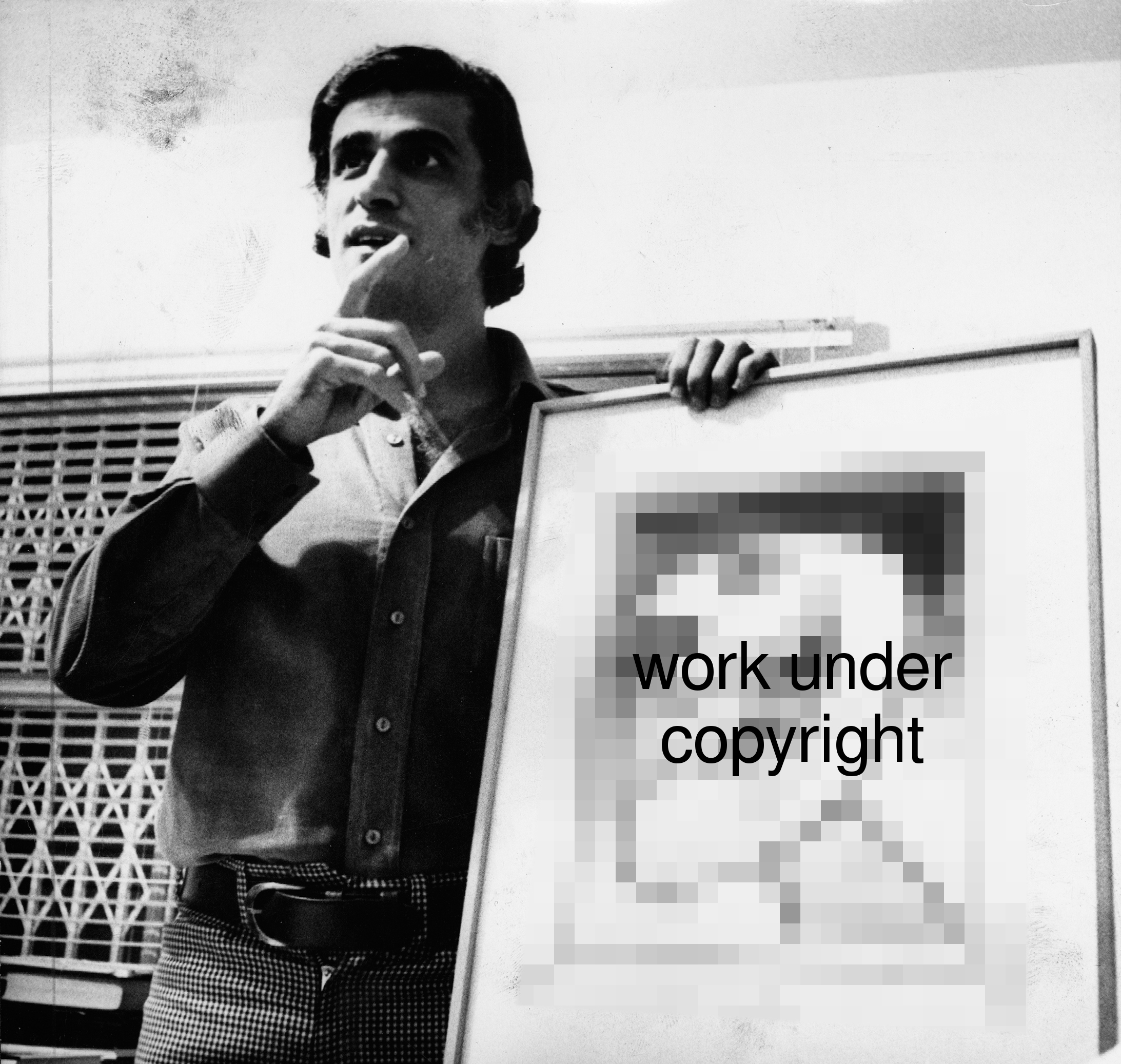 Imagem do Fundo Correio da Manhã.